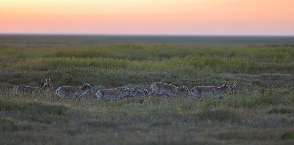 Сайгаки в заповеднике "Чёрные земли"